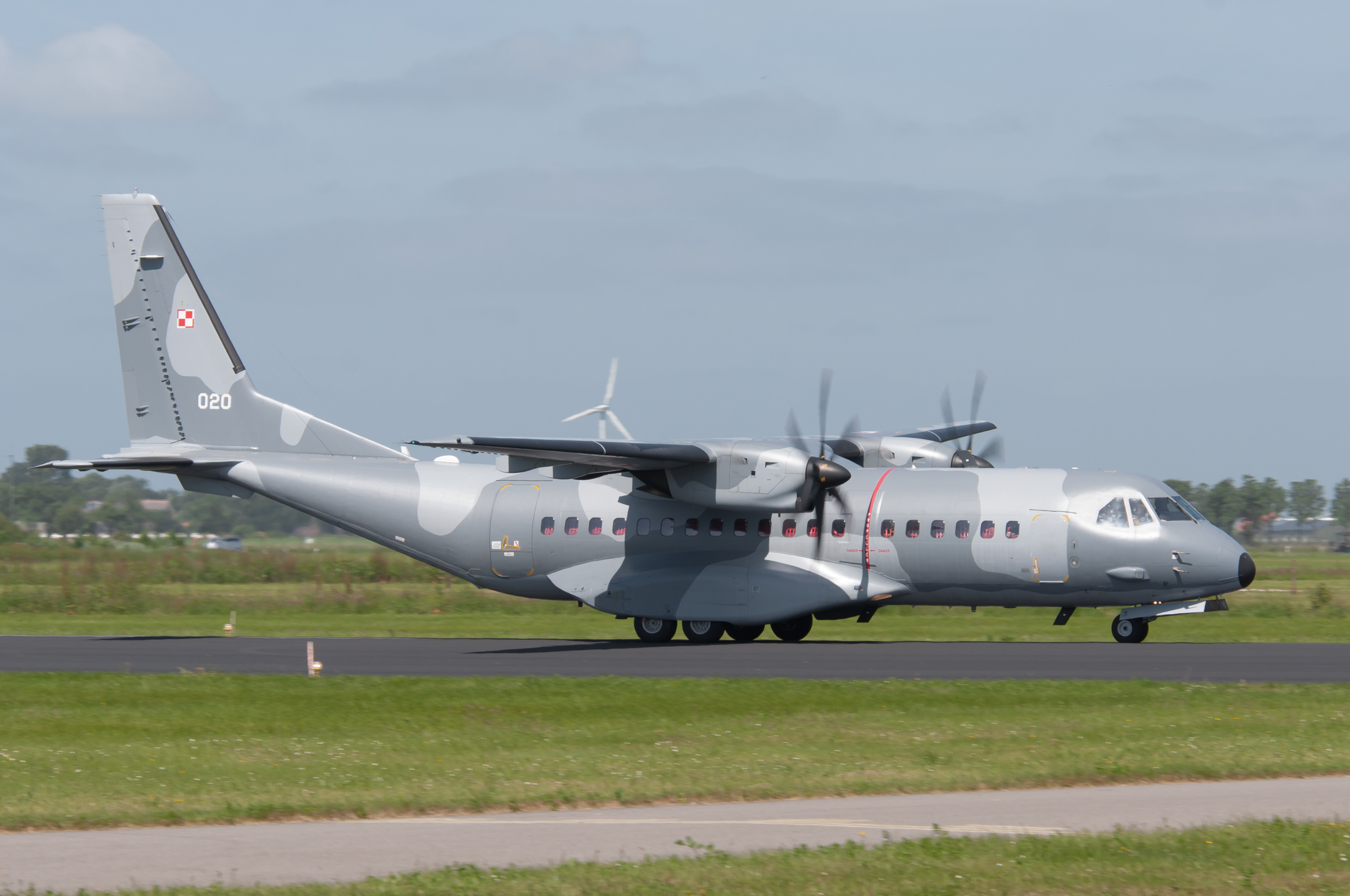 Leeuwarden, June 2016 KLu Open Dagen